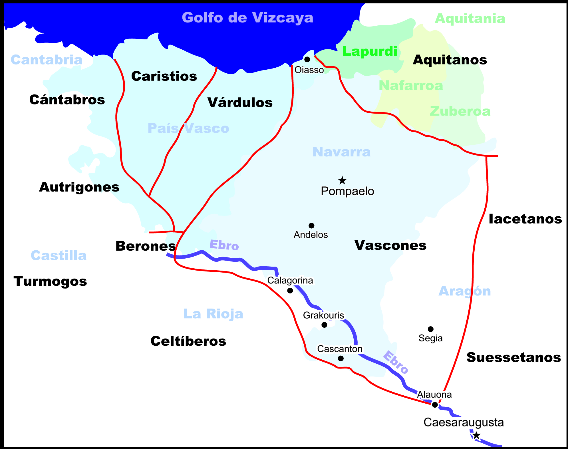 Mapa de las tribus prerromanas de Caristios, Várdulos Vascones y Aquitanos según Ptolomeo